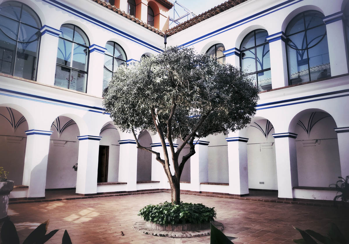 Casa de la Cultura (Imagen cedida por M. Martínez)